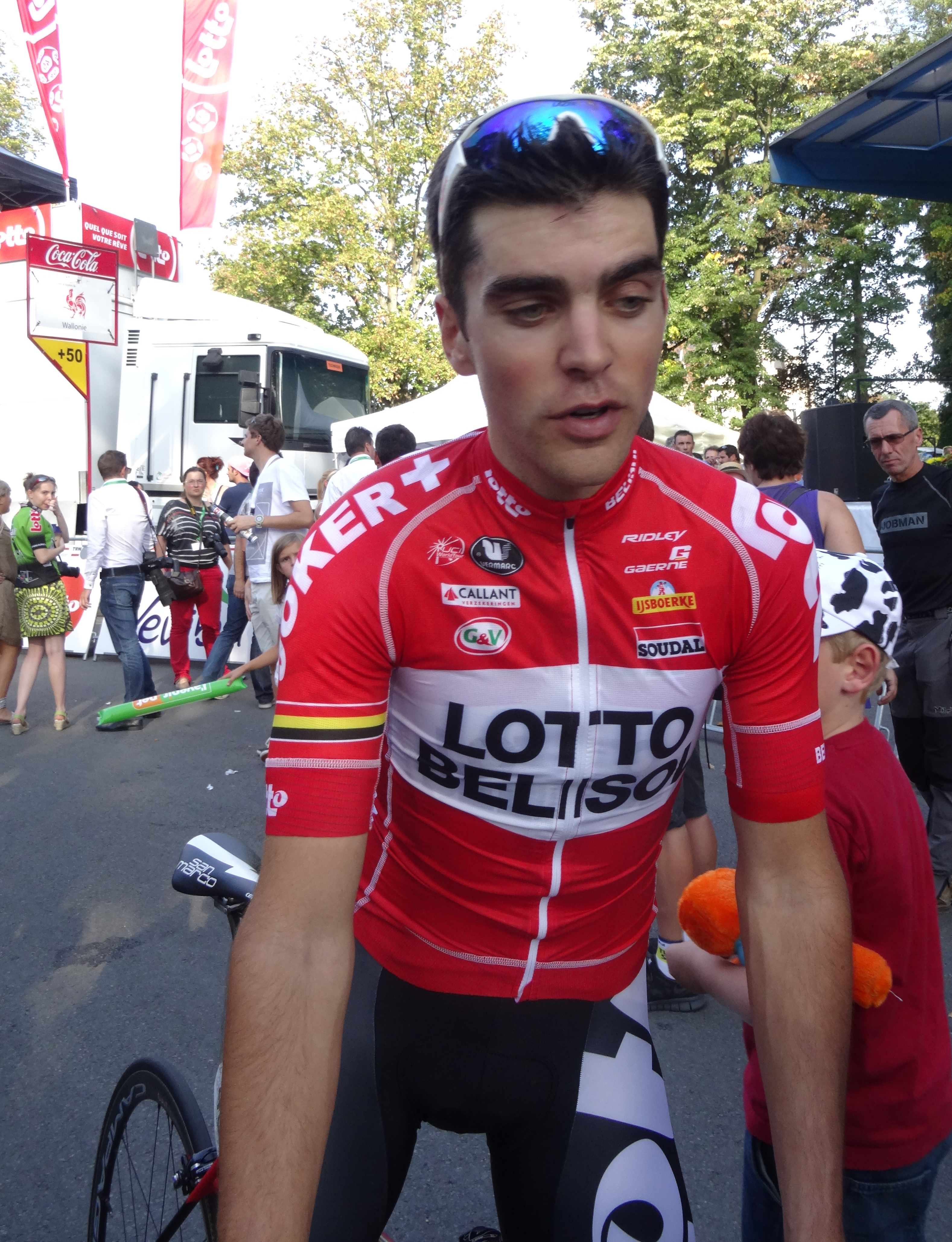 Reportage photographique réalisé le mercredi 17 septembre à l'occasion de l'arrivée du Grand Prix de Wallonie 2014 à la citadelle de Namur, Belgique.